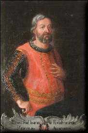 Vok I. z Rožmberka